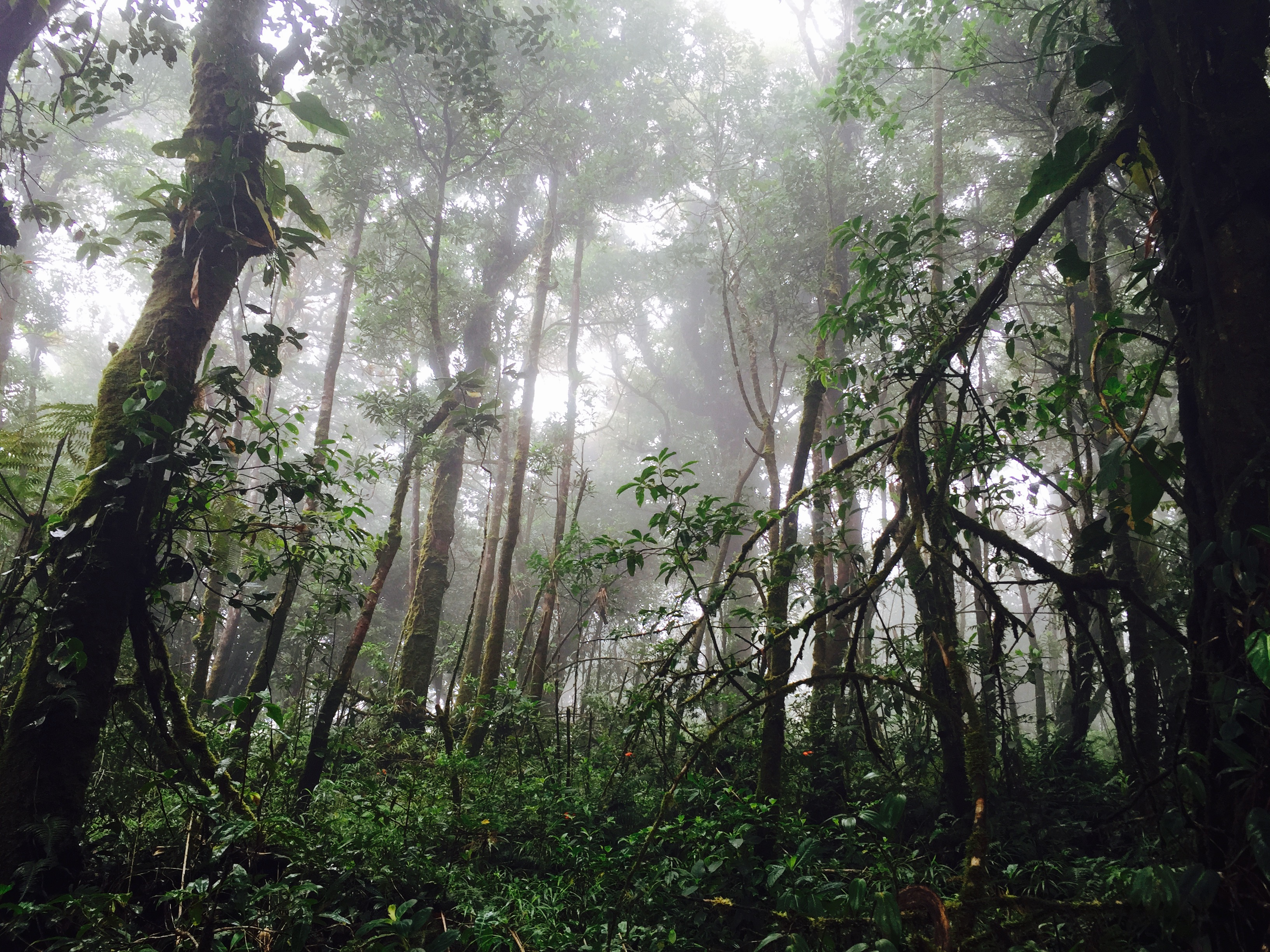 Vida con el agua